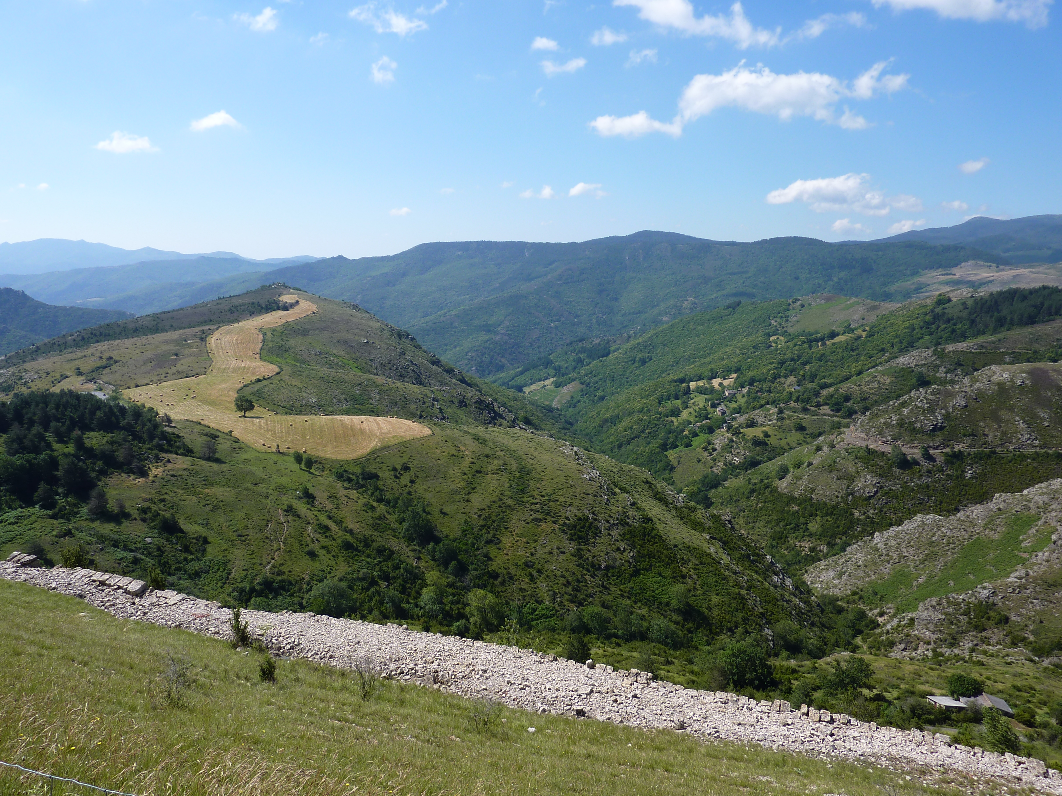 Corniche des Cévennes: le panorama vu du col des Faisses